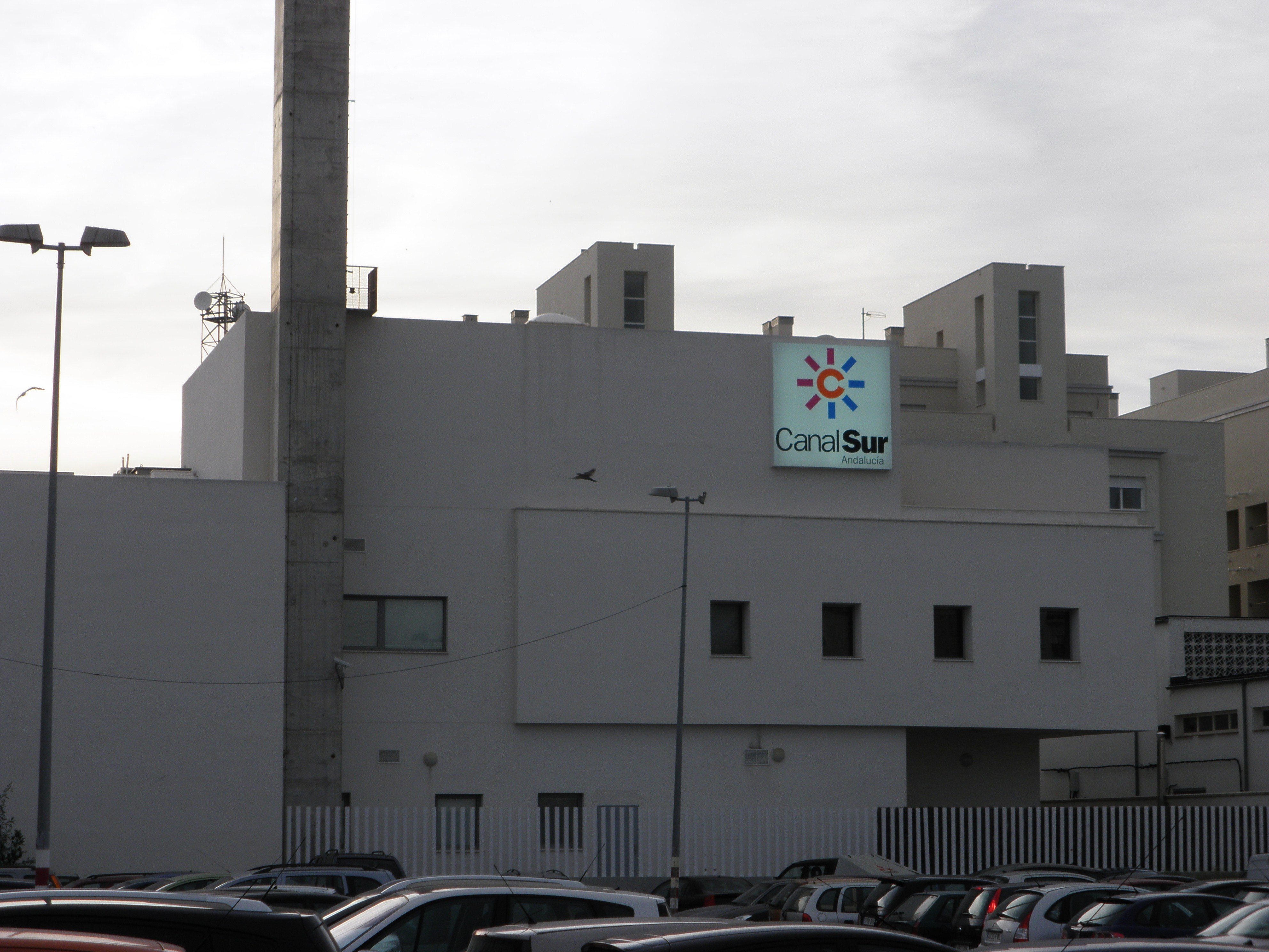 Canal Sur Andalucía